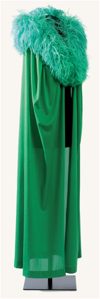 Capa amb draperies. MTIB. Fotografia de La Fotogràfica